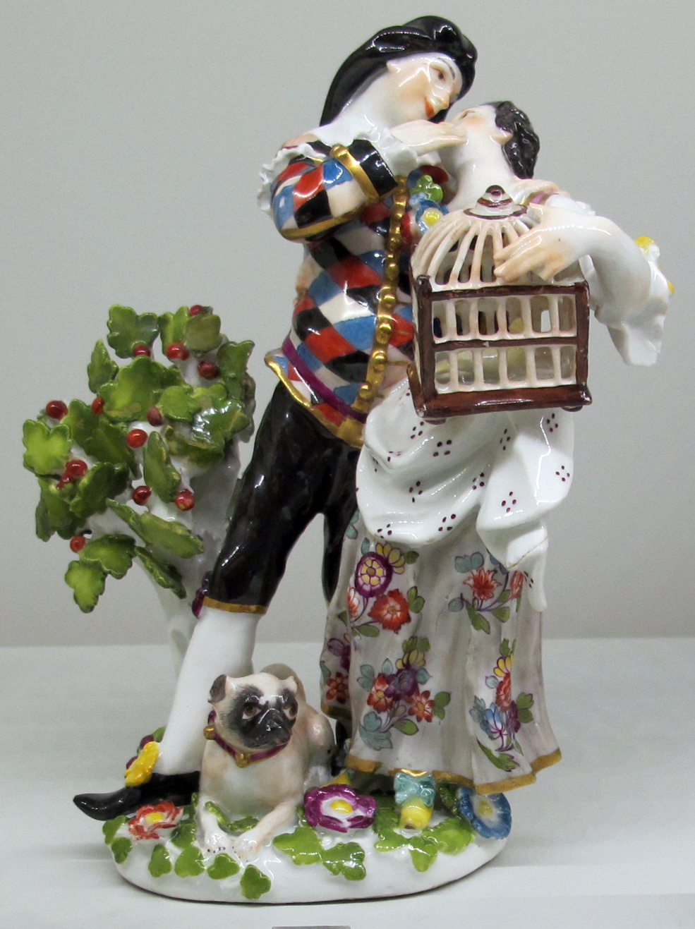 Meissen, johann joachim kaendler, scaramuccia e colombina, 1740-41 ca.